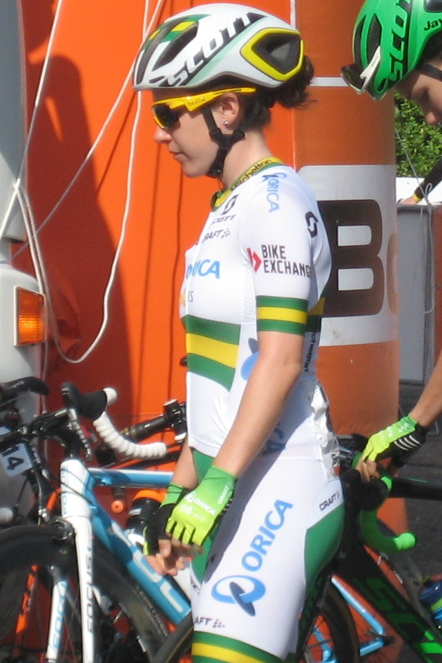 Amanda Spratt (Orica-AIS) voor start 3e etappe Holland Ladies Tour 2016